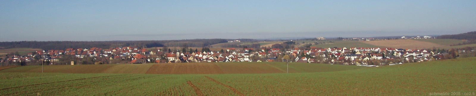 Blick von Süden auf Bad Rappenau-Bonfeld